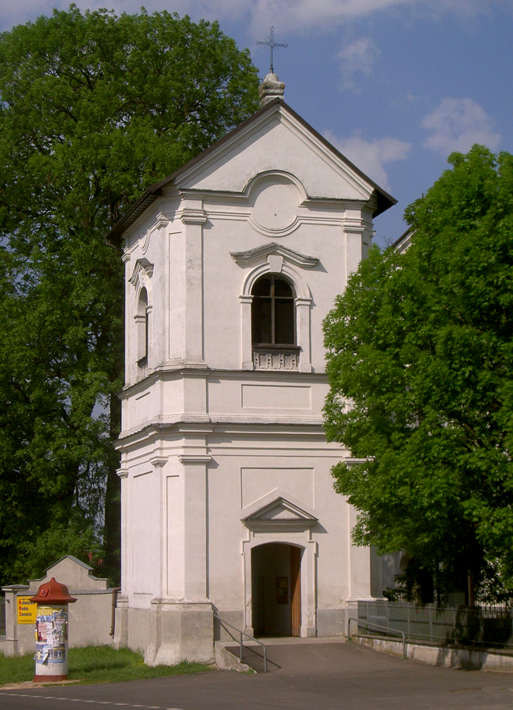 Tarnogród, Poland - Belfry from 1777 • Tarnogród, Polska - Dzwonnica z 1777